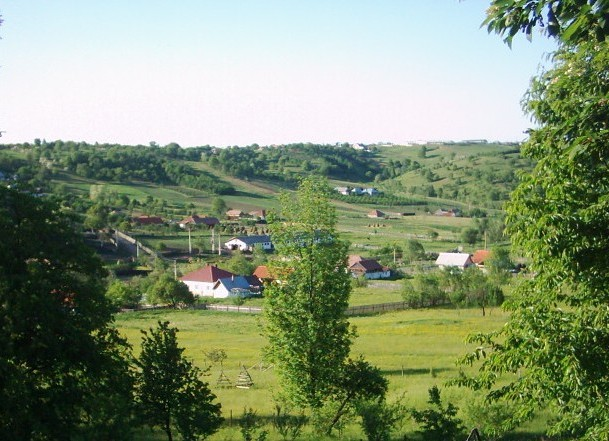 peisaj din Valea Sosii